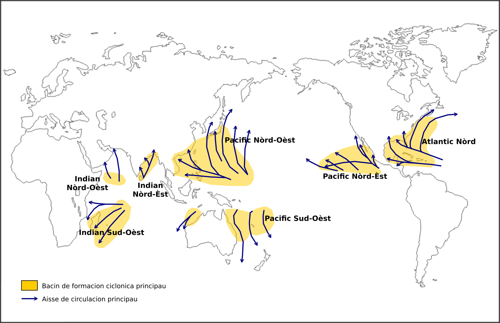 Bacins de formacion ciclonica principaus